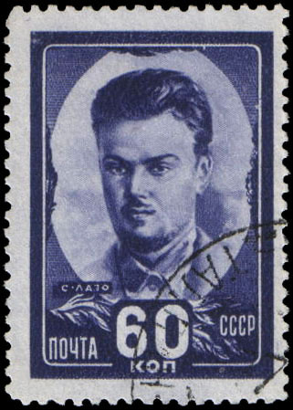 Почтовая марка СССР - Сергей Георгиевич Лазо, русский революционер